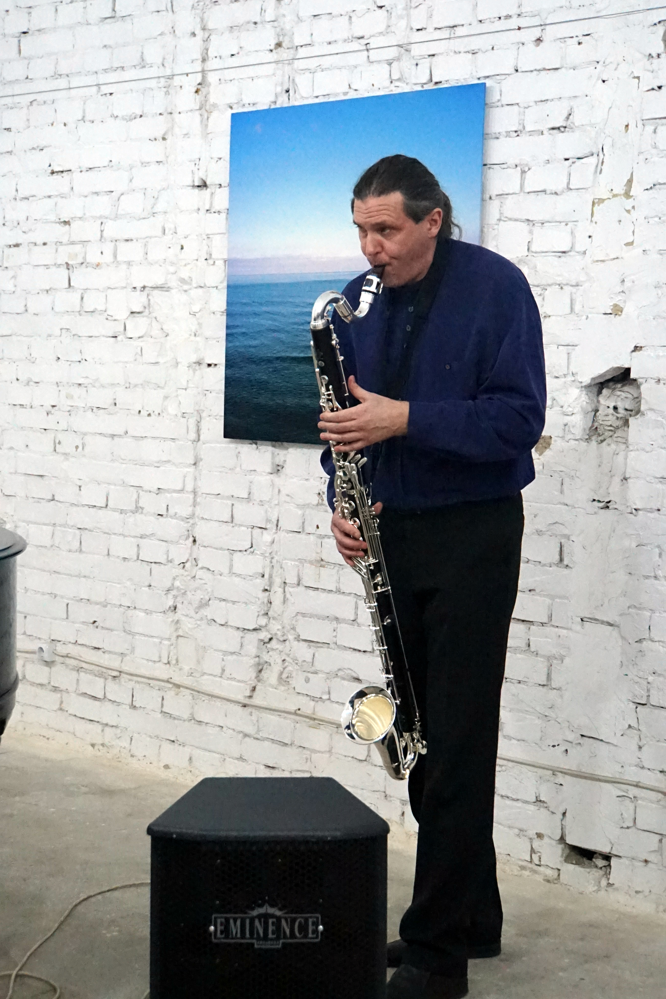 Meelis Vind esinemas Arne Maasiku fotonäituse "Vaga vesi" avamisel, Budapest